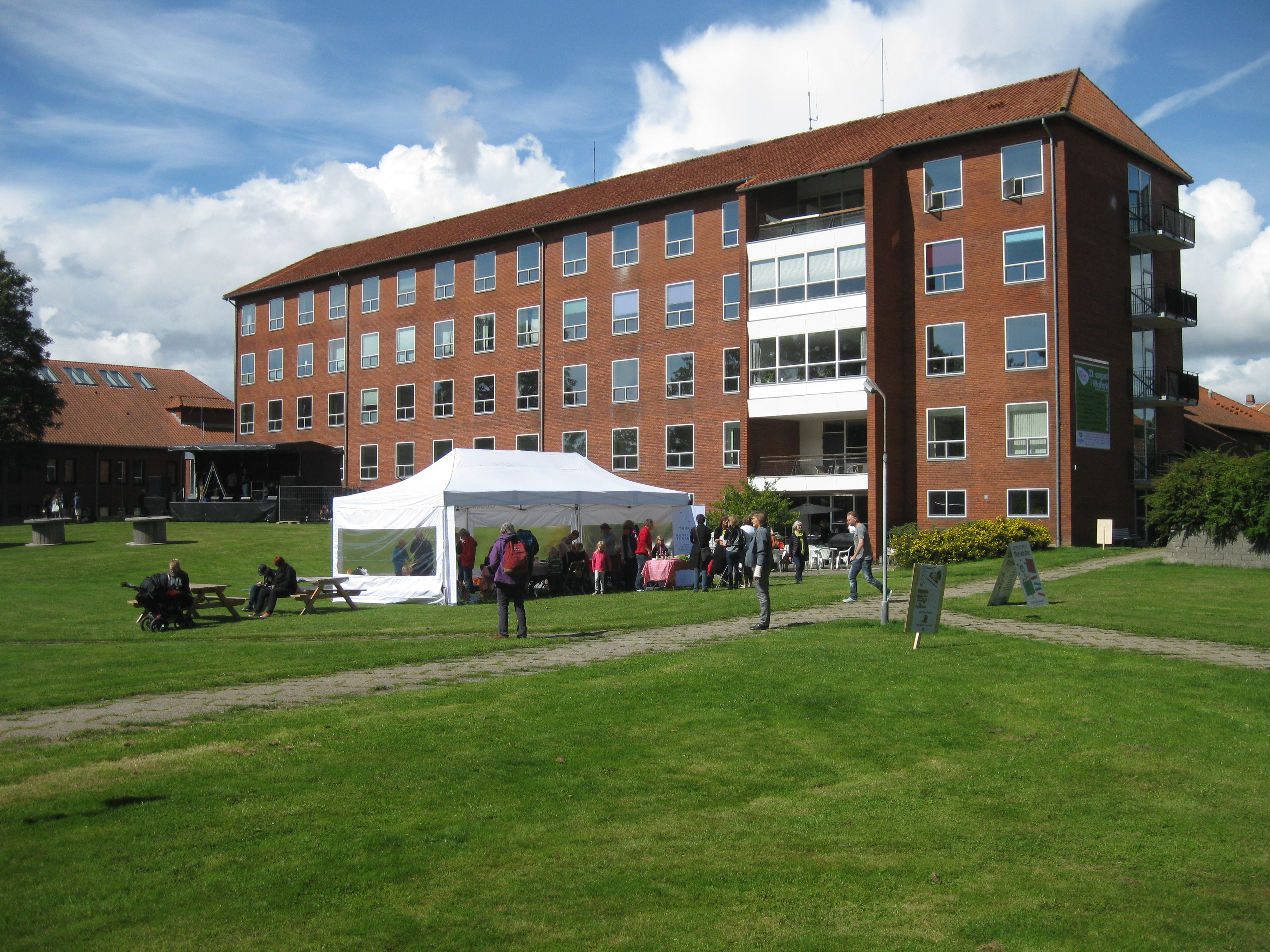 VitaPark Odder